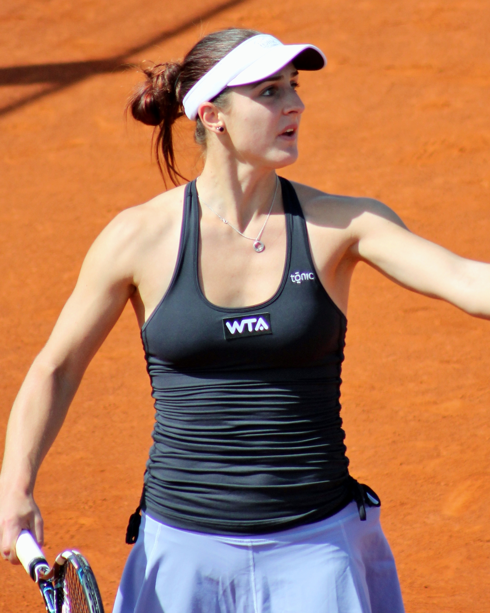 Dabrowski MA14 (5)